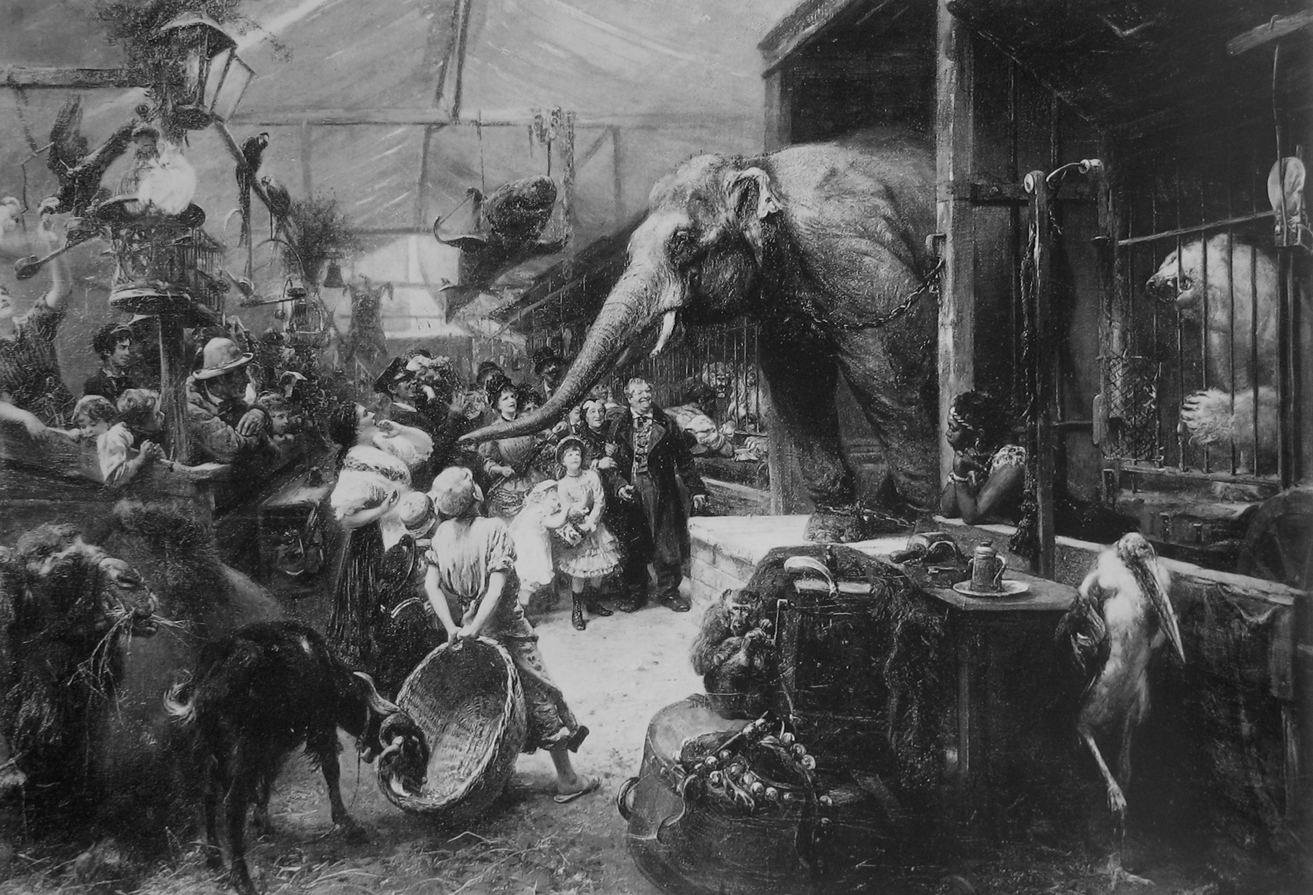 Tierbude; Fotogravur nach einem Gemälde von Paul Friedrich Meyerheim (1842-1915)